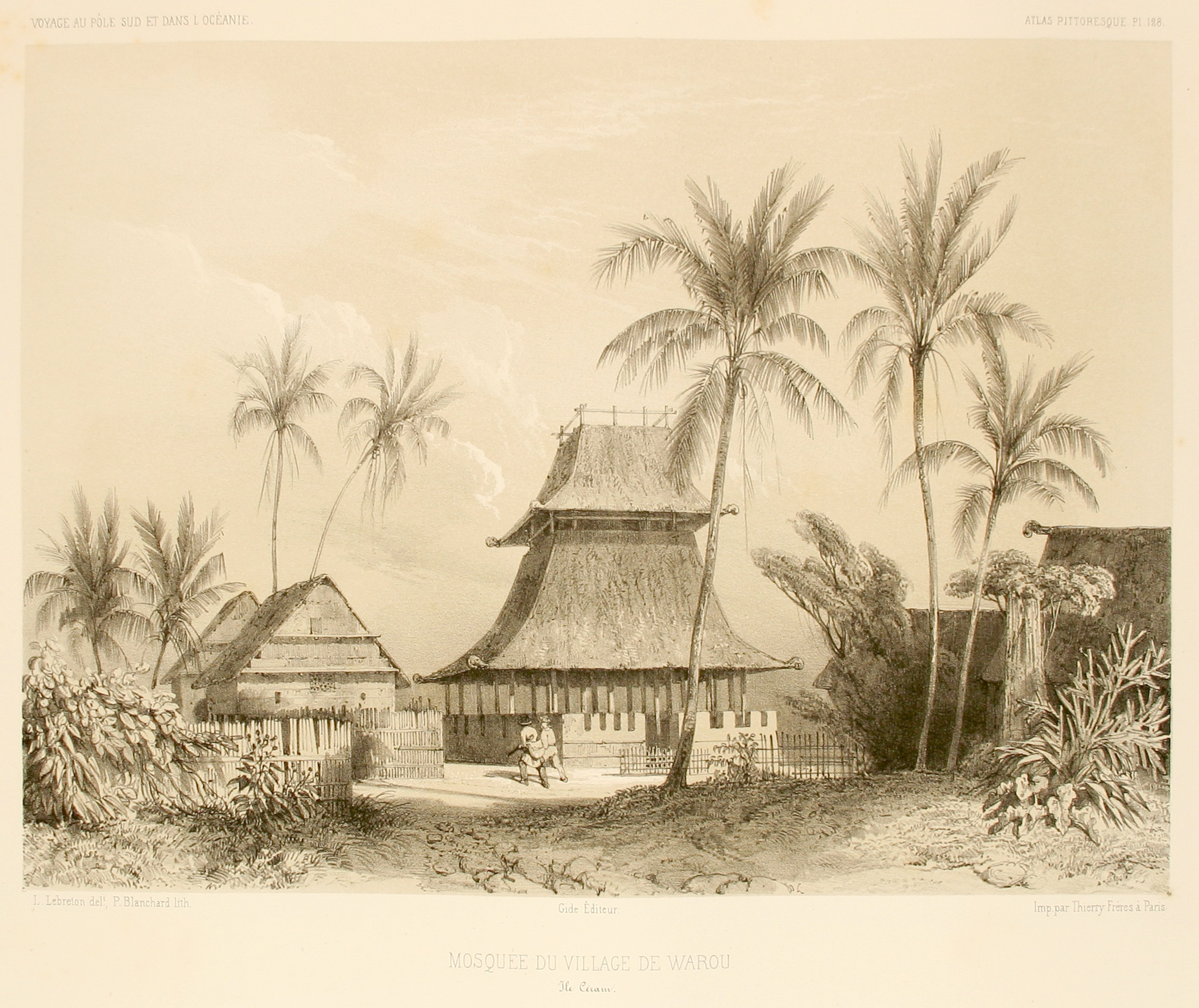 Mosquée du village de Warrou. Atlas pittoresque, planche 128